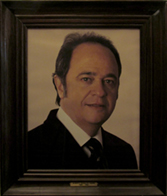 Alberto Pierri, diputado argentino.